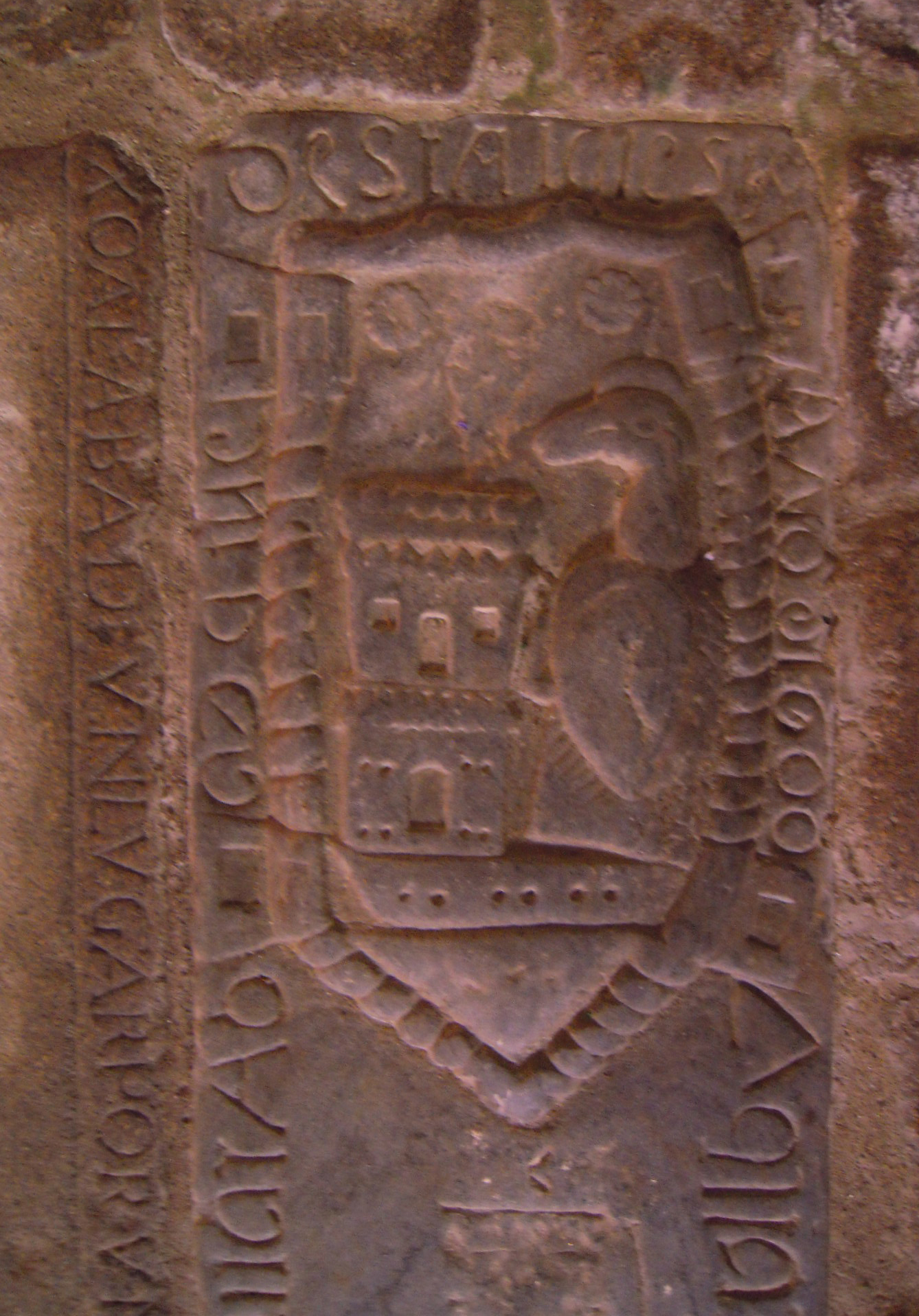 Escudo de Monforte de Lemos nun sartego na Igrexa de Santo Estevo de Ribas de Miño.